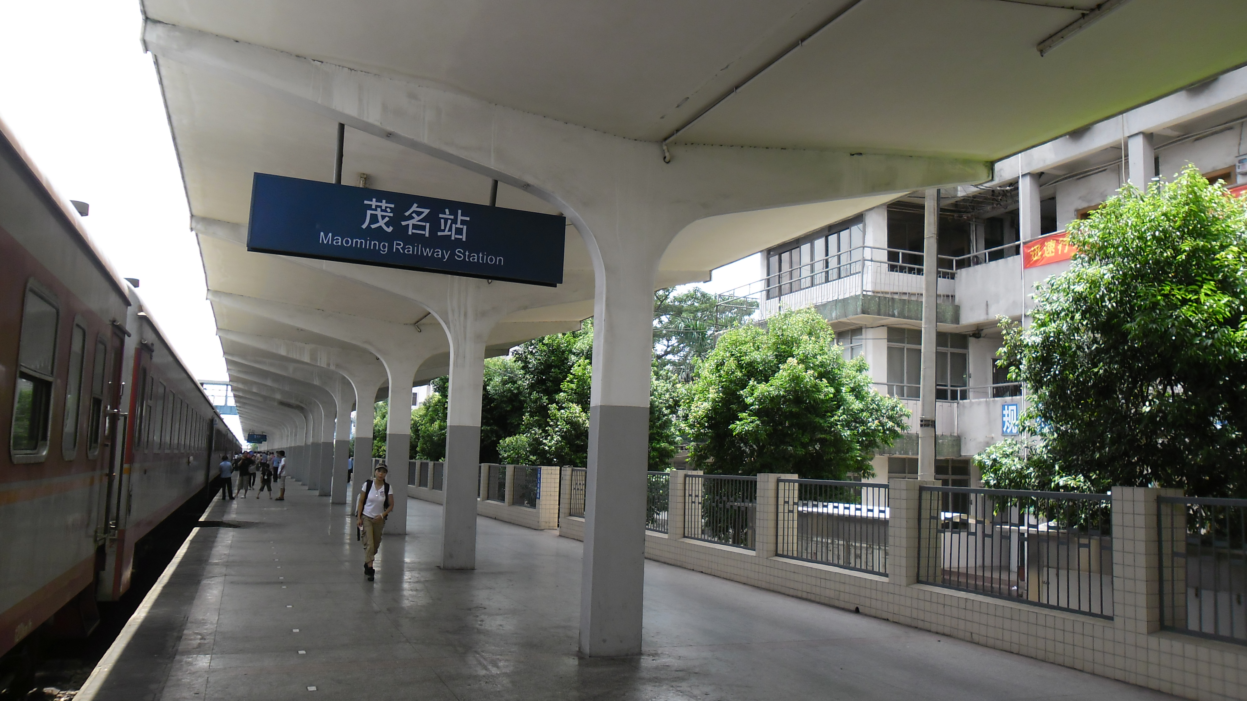 中文（中国大陆）: 2011年的茂名站站台